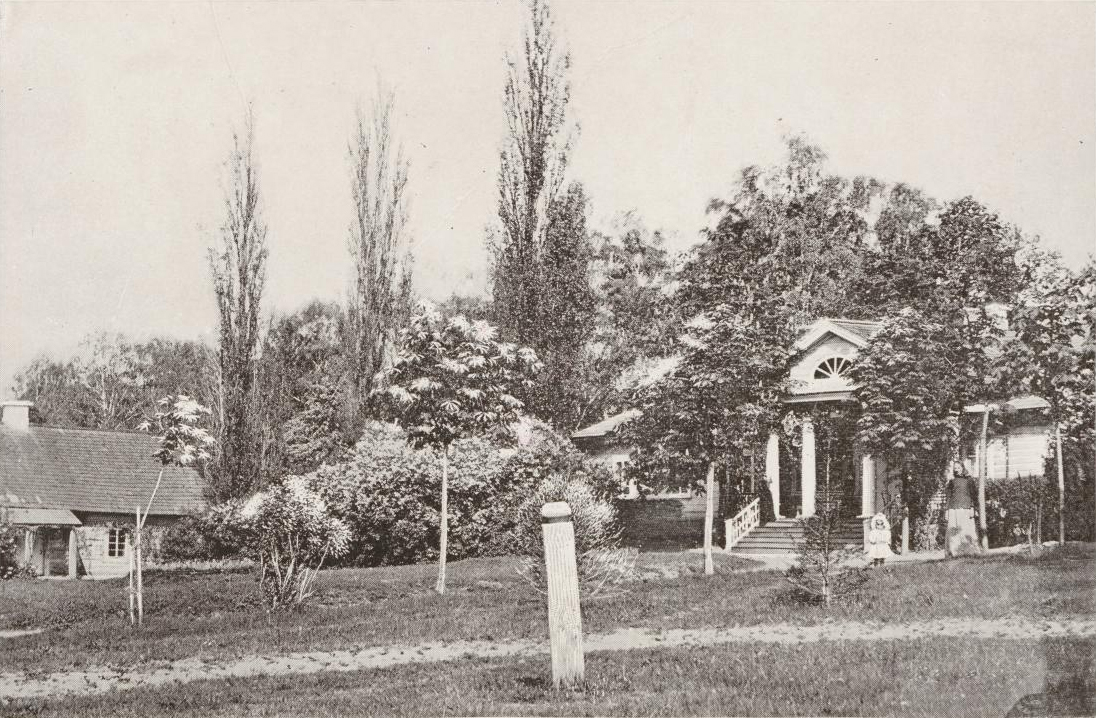 Беларуская (тарашкевіца): Далматаўшчына (Dałmataŭščyna), сядзіба Вярбоўскіх (Viarboŭski). Галоўнае месца збору філярэтаў